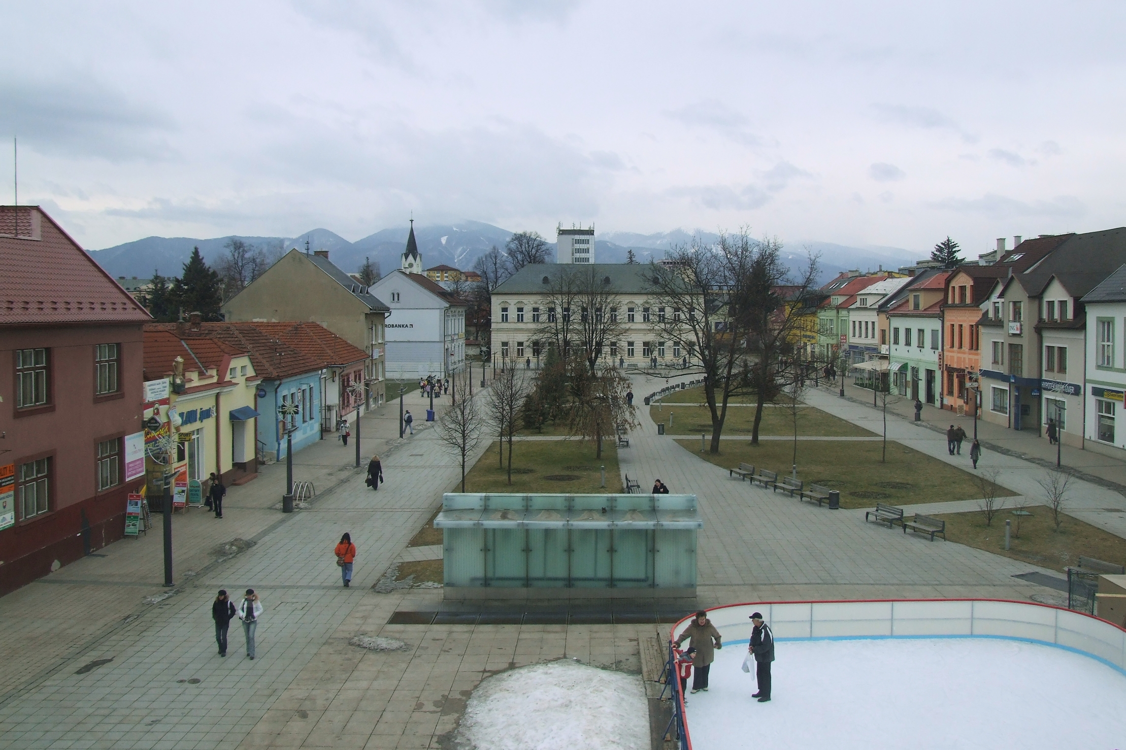 Martin - centrum miasta